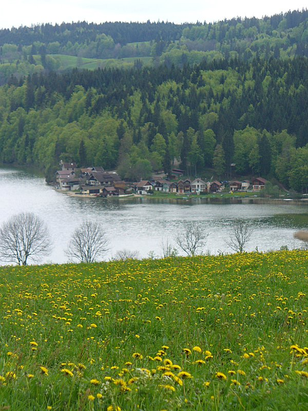 Auteur: Utilisateur:Suaudeau Description: Vue de la commune des Grangettes: hameau de Port-Titi.